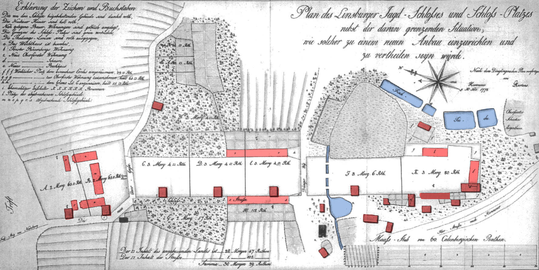 Jagdschloss Linsburg nach Teilabriss von Schlossgebäude und Erstellung neuerer Gebäude, nachträglich koloriert